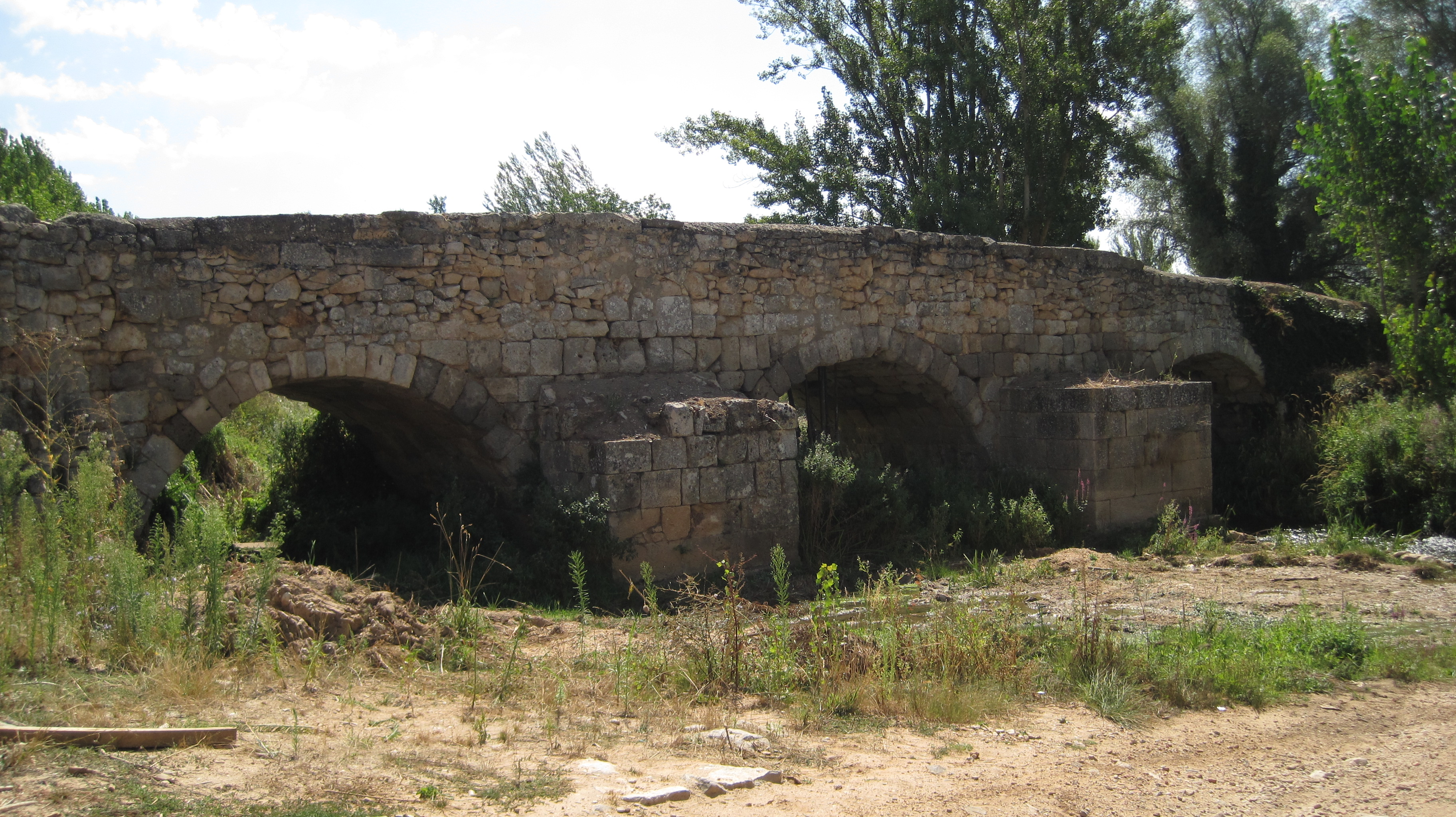 Vista de uno de los puentes romanos de Coruña del Conde (Burgos, España).